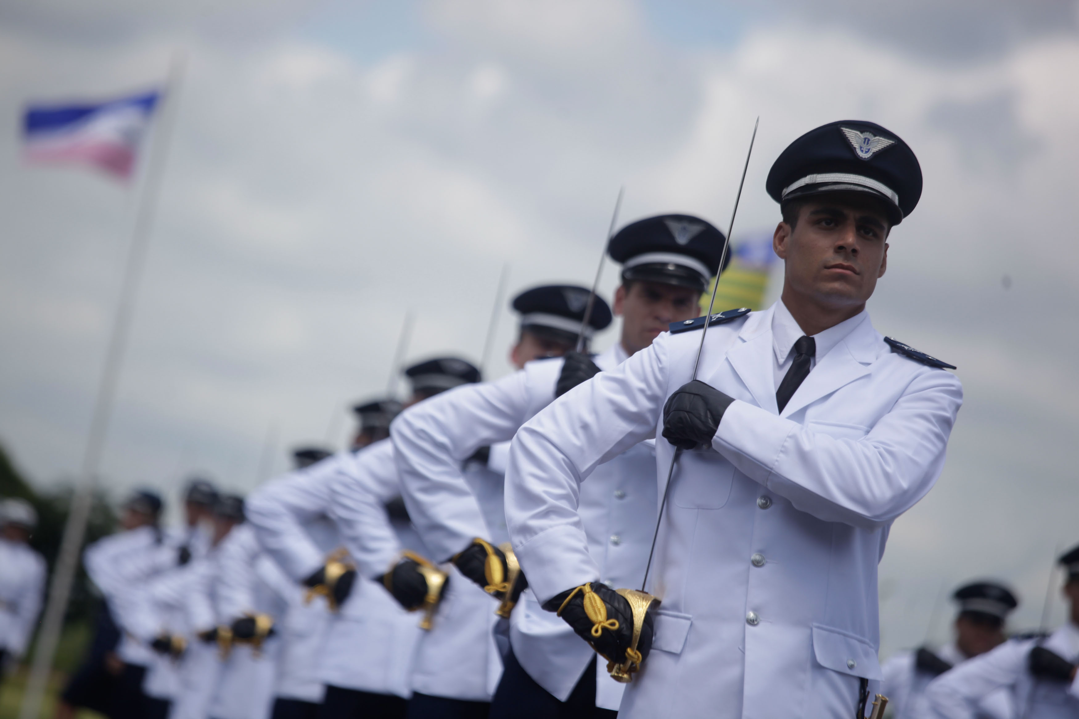 11/12/2015, Pirassununga - SP Fotos: Felipe Barra / MD